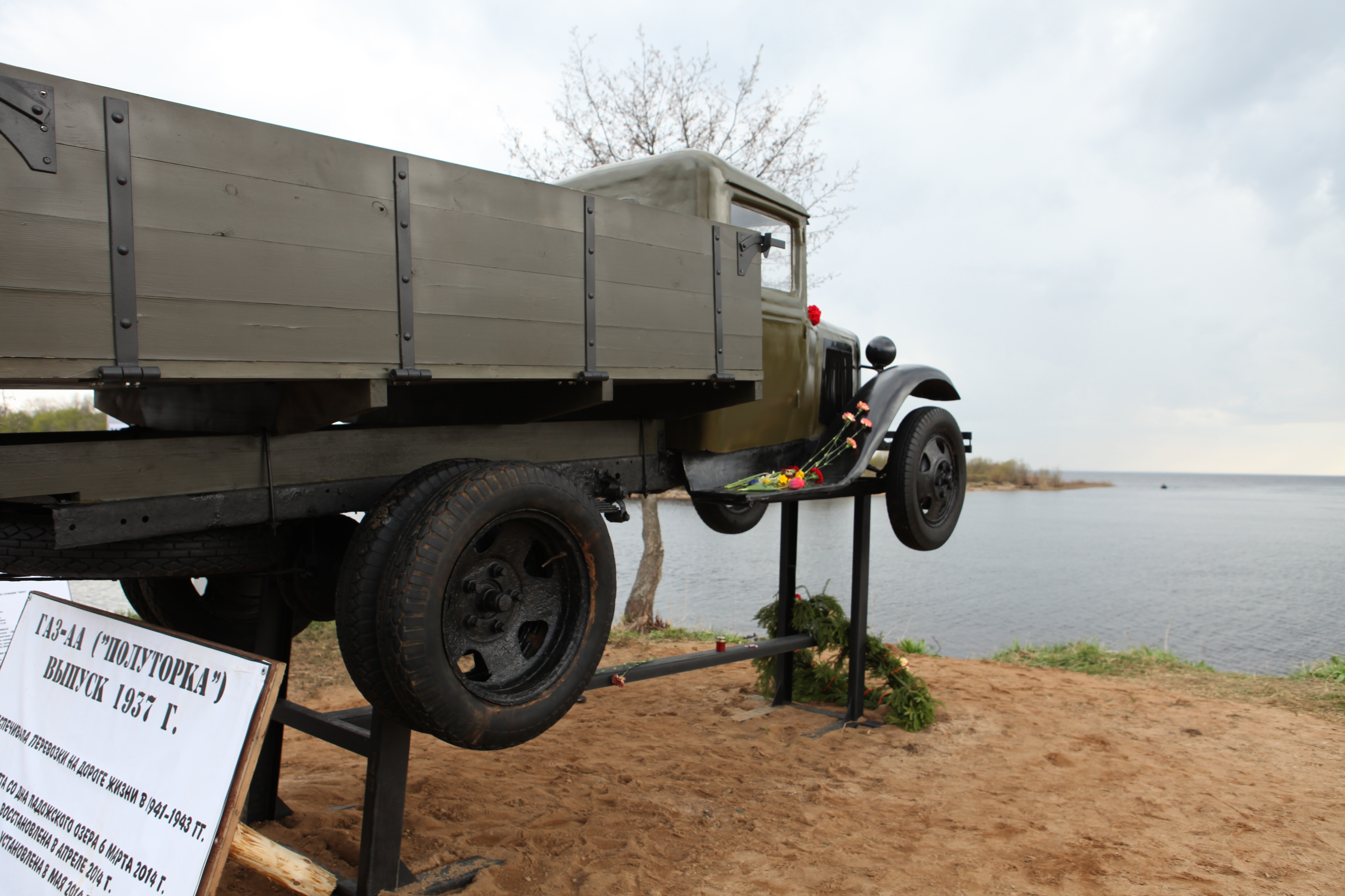 Фото сделано в день открытия памятника "Полуторка"